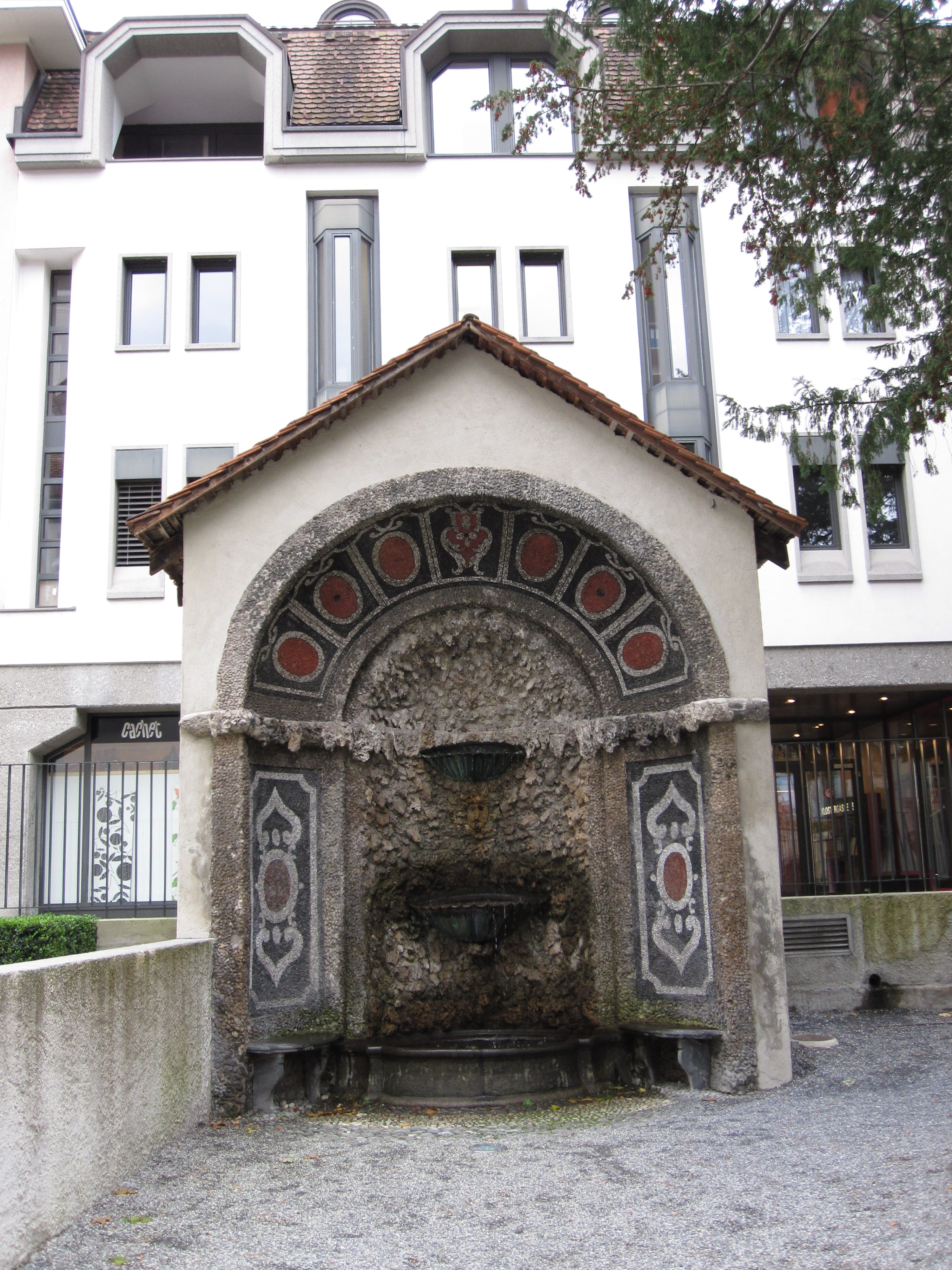 Grotte im Fontanapark Chur (Kanton Graubünden) aus den Jahren 1727-29